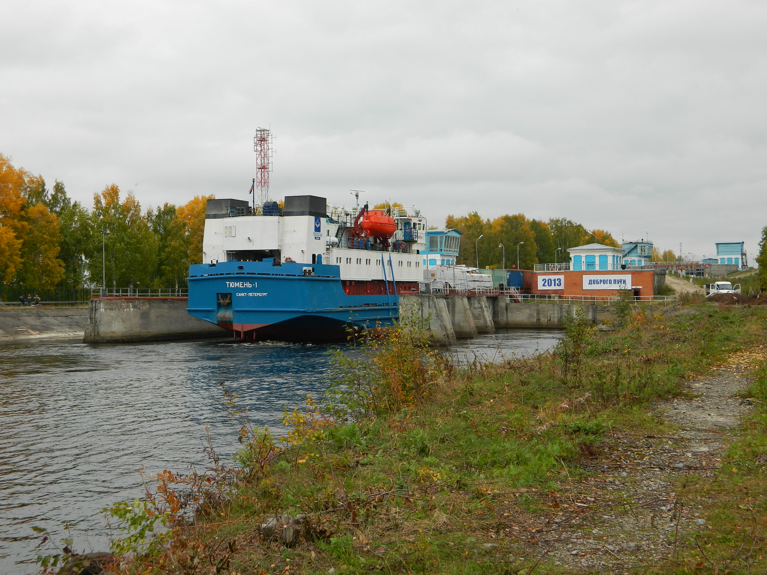 Сухогруз заходит в первый шлюз Беломорканала